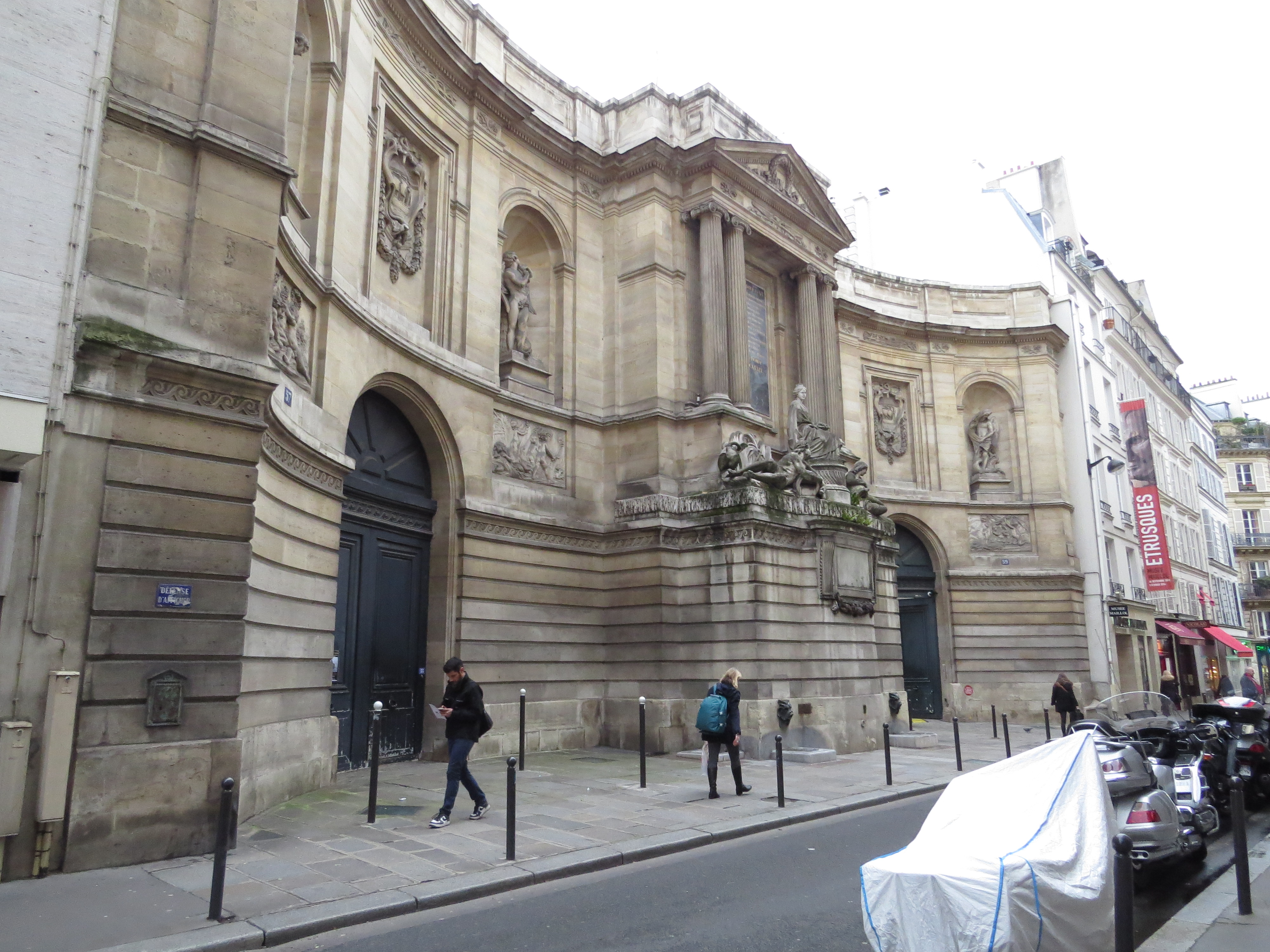 Extérieur du Musée Maillol (Paris) - Paris 7ème - Vue d'ensemble coté gauche